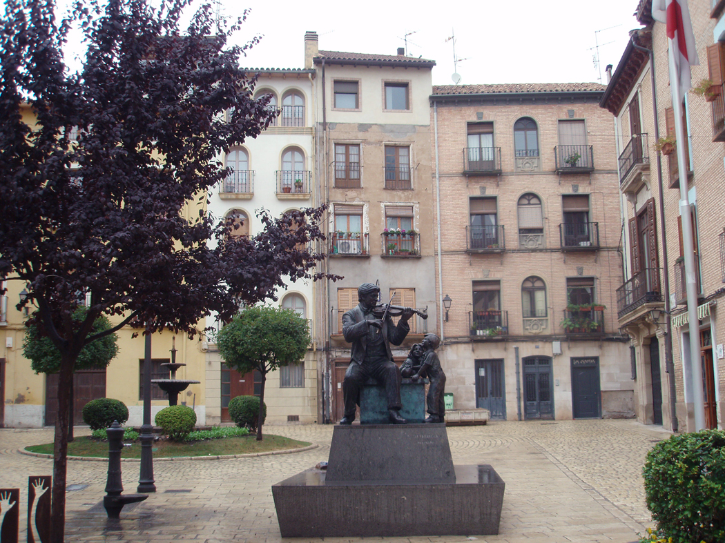 Plaza del Mercadal de Tudela, en 2008